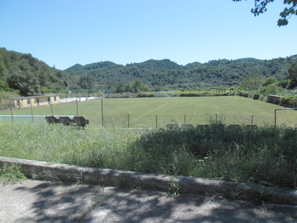 nogometno igralište u mjestu Lastovu